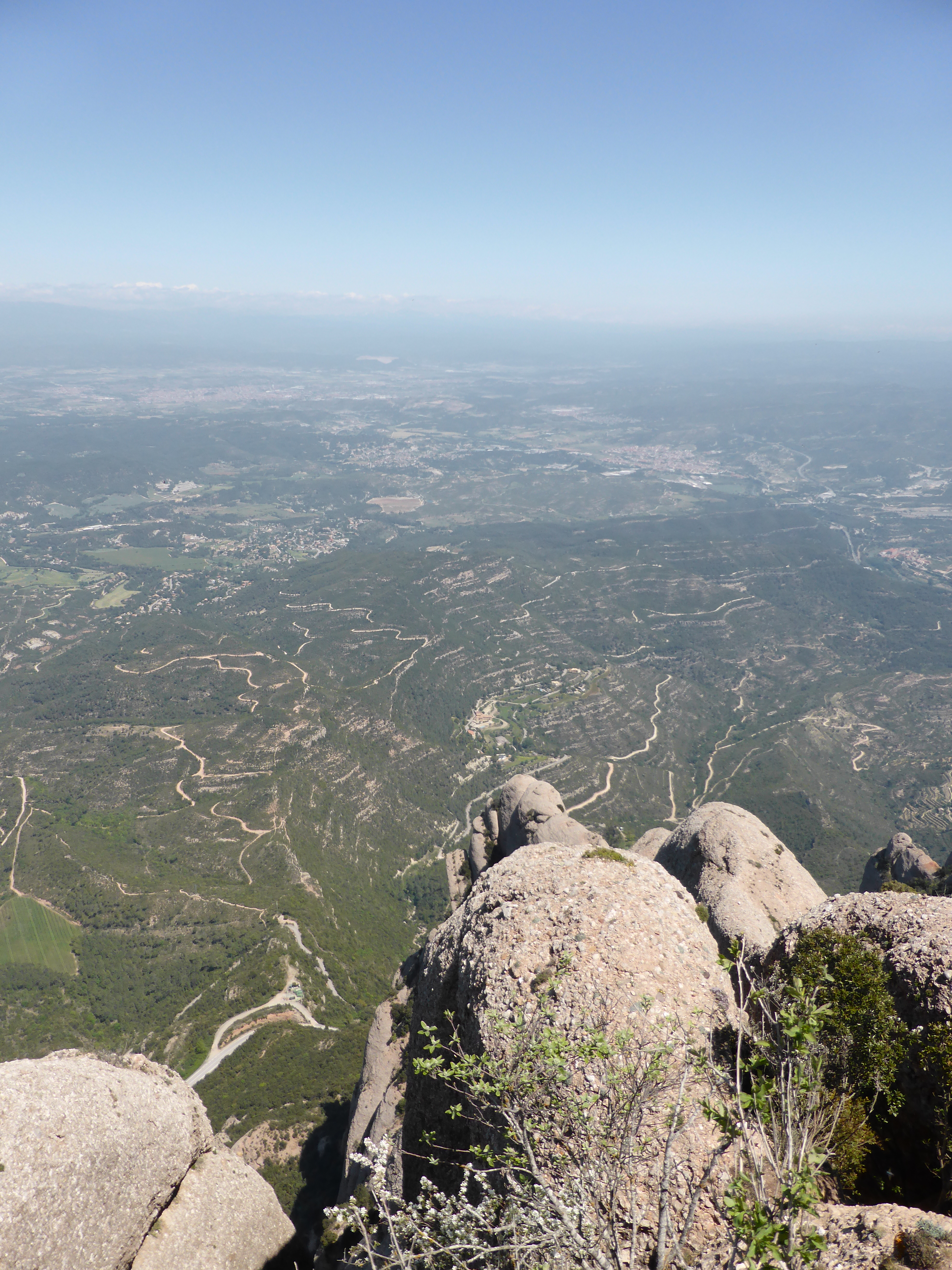 Vue du Mont Sant Jeroni